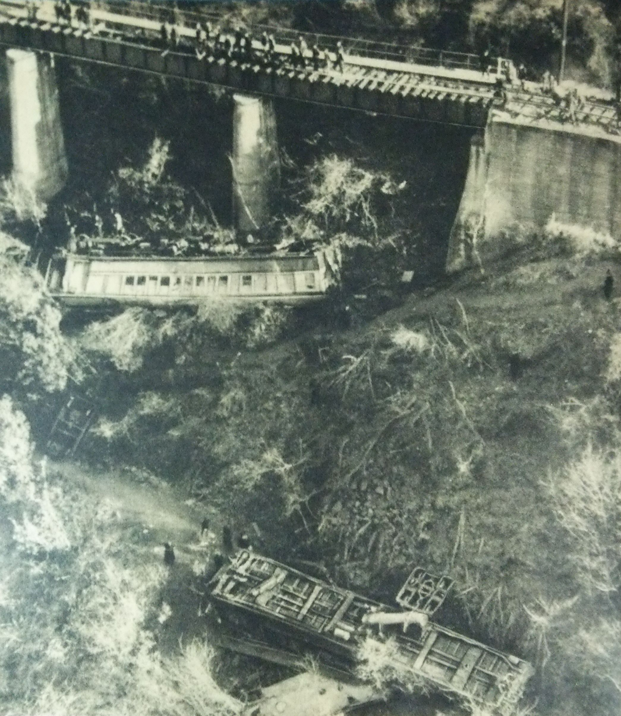 飯田線大表沢鉄橋脱線転覆事故